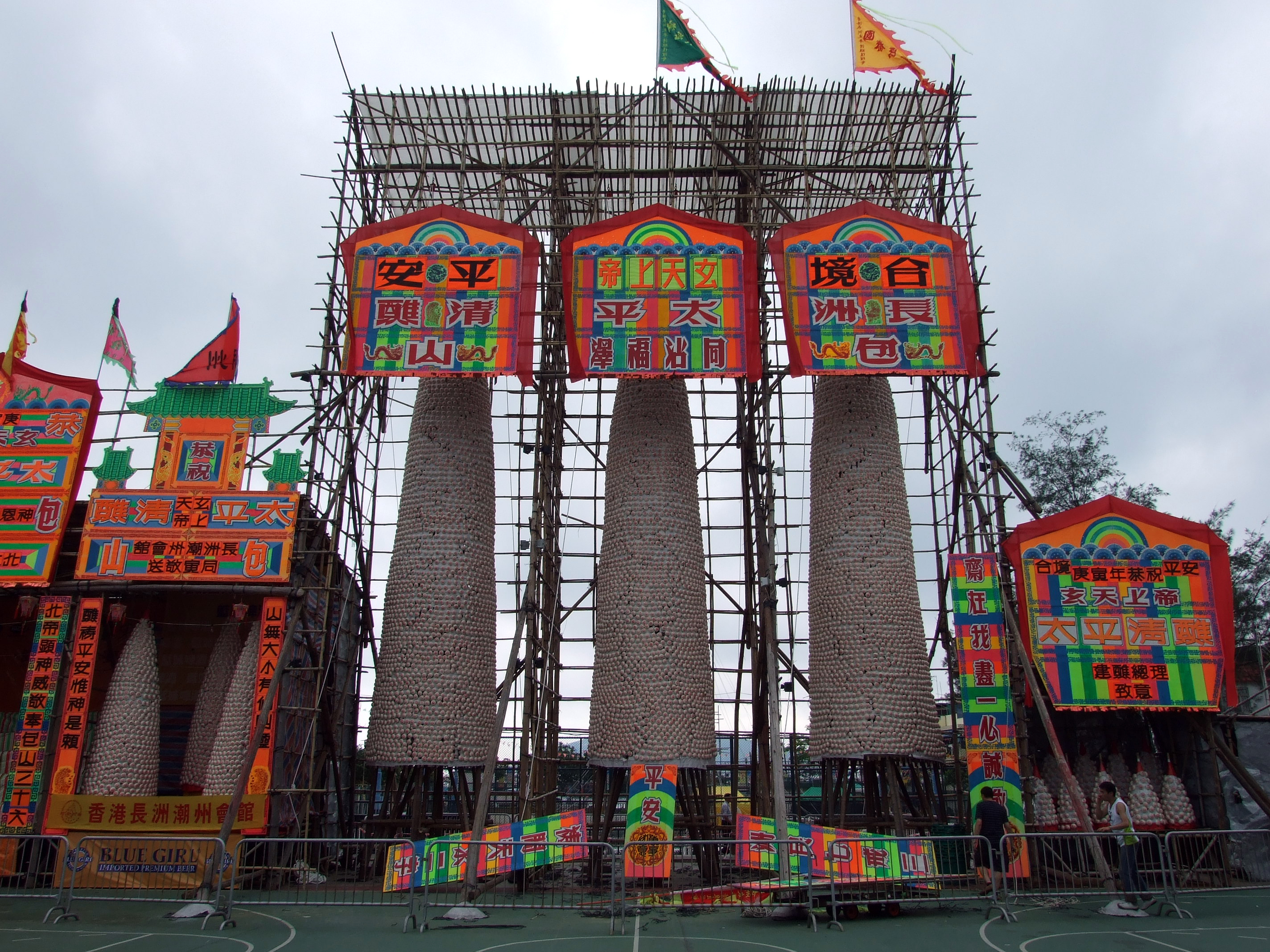 中文（香港）: 長洲太平清醮又稱包山節